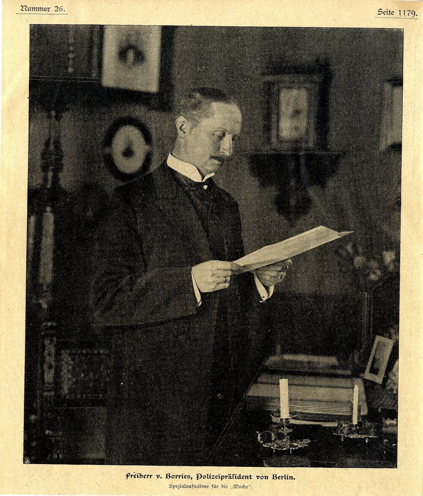 Georg Hermann Julius Bodo Friedrich von Borries junior (* 9. März 1857 in Herford; † 19. Dezember 1922 in Bad Oeynhausen) wurde 1902 zum Polizeipräsidenten von Berlin ernannt. Dieses Amt übte er vom 1. Januar 1903 bis zu seiner Versetzung als Regierungspräsident nach Magdeburg im Jahr 1908 aus.